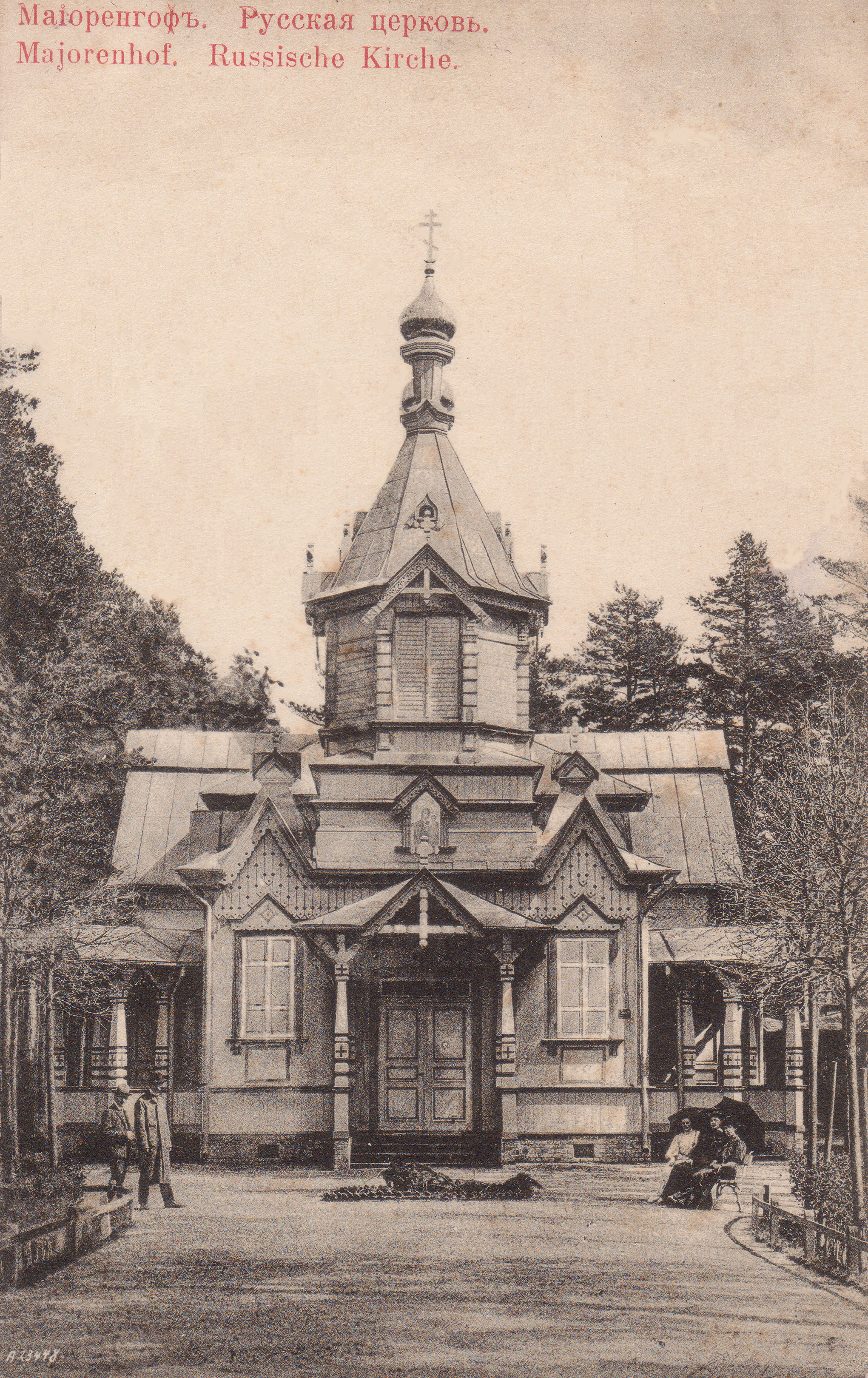 Храм Казанской иконы Божией Матери в Майоренгоф (Дзинтари)